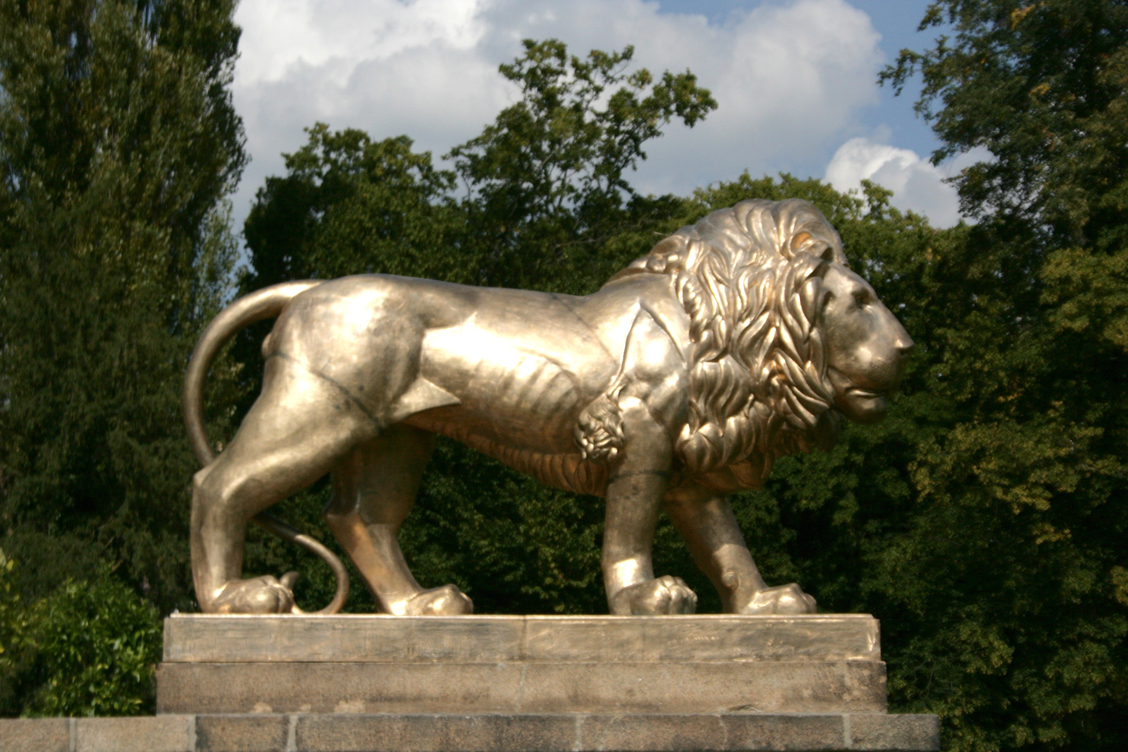 Löwenstatue am Neuen Schloss in Bad Muskau